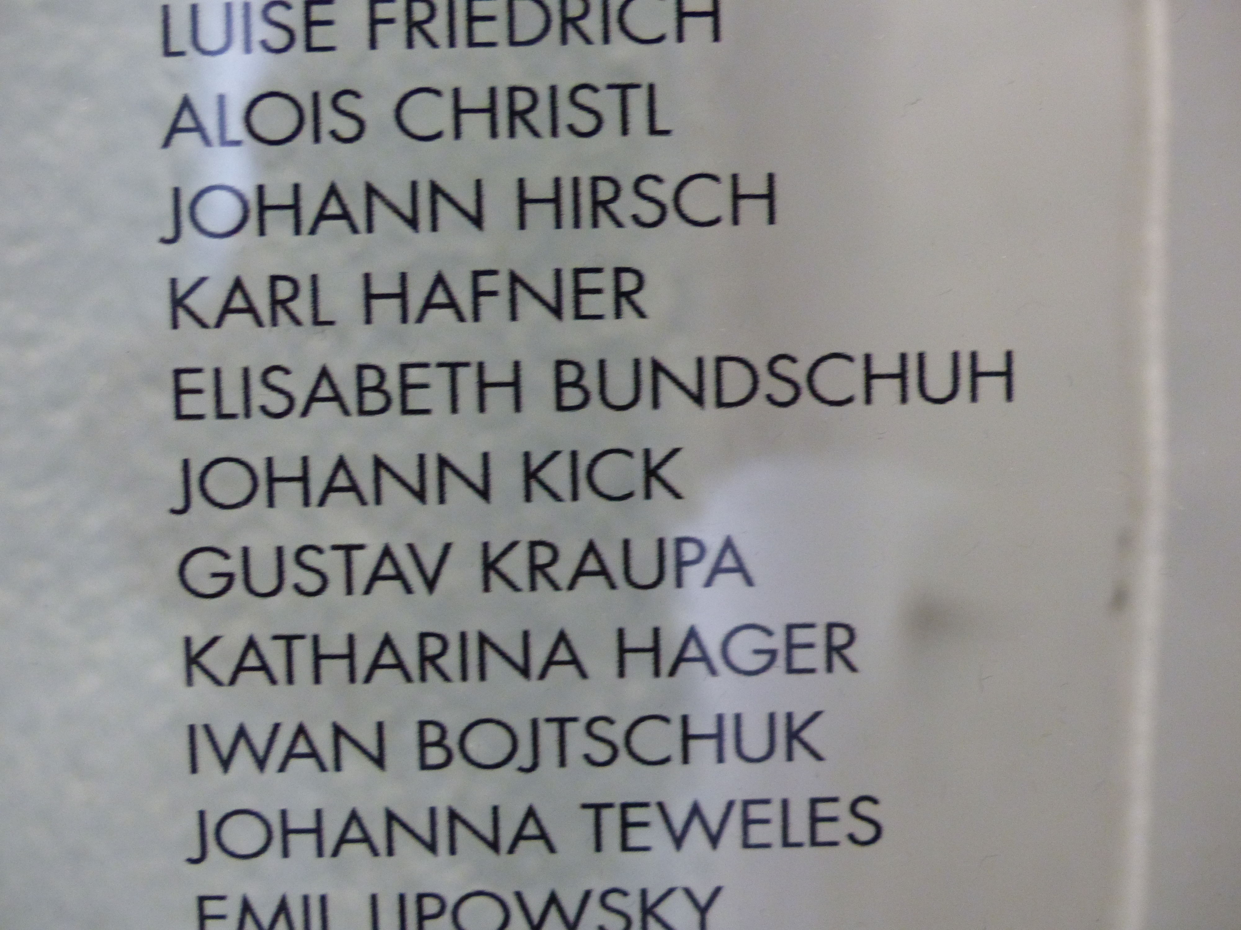 Schloss Hartheim Aufnahmeraum: In diesem Raum wurde während der Aktion T4 die Identität der Personen festgestellt. Unmittelbar danach führte man die Menschen in die unmittelbar angrenzende Gaskammer. Heute befinden sich in dem Raum Glaswände auf denen die Namen der 30.000 Opfer stehen. Auch der Namen meiner Großtante Elisabeth Bundschuh, die im Februar 1941 hier getötet wurde, steht auf einer dieser Tafeln. Möge ihre Seele Frieden gefunden haben! Hier gibt es Informationen über sie